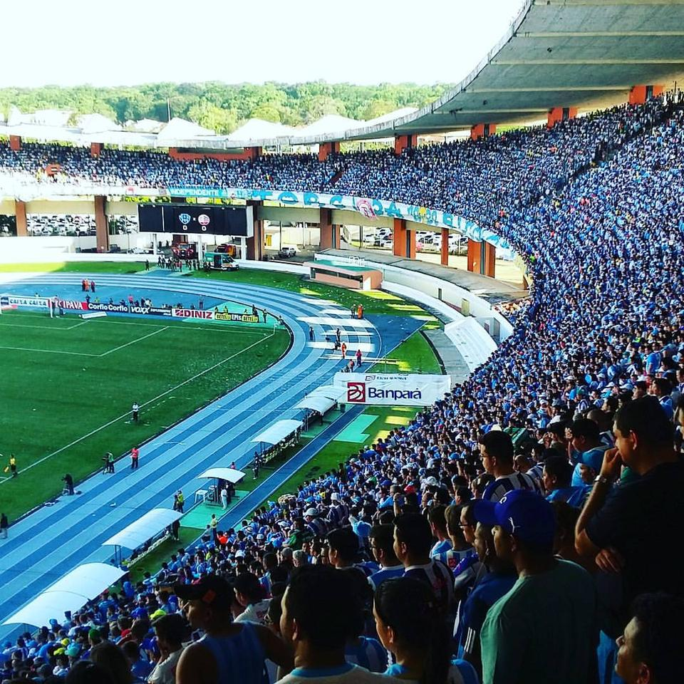 Estadio do mangueirão cheio paysandu